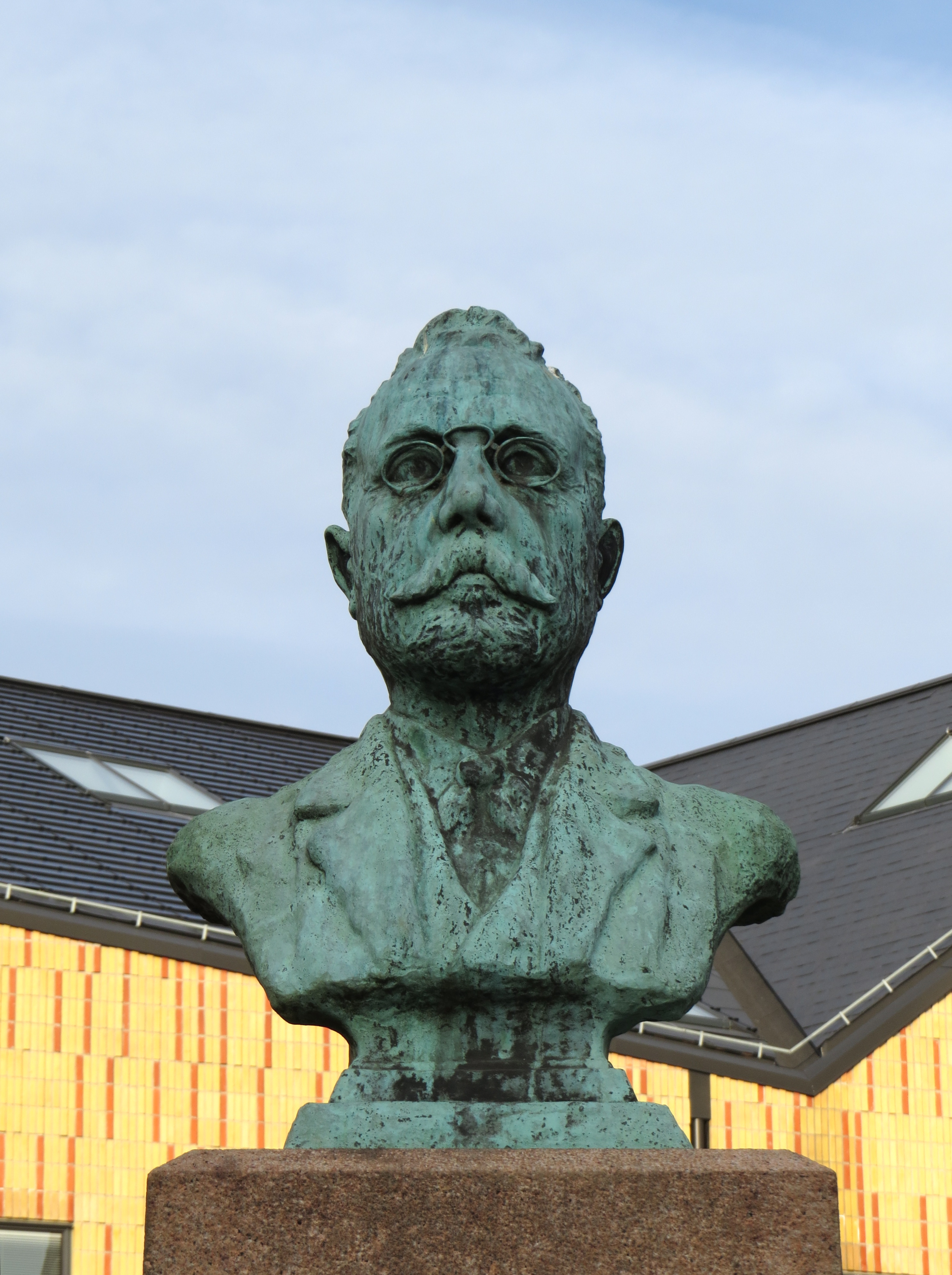 Buste forestillende hospitalsdirektør H.V.S. Gredsted (1848-1910) med pince-nez, 1912, af Helen Dohlmann (1870-1942), Kommunehospitalet, København